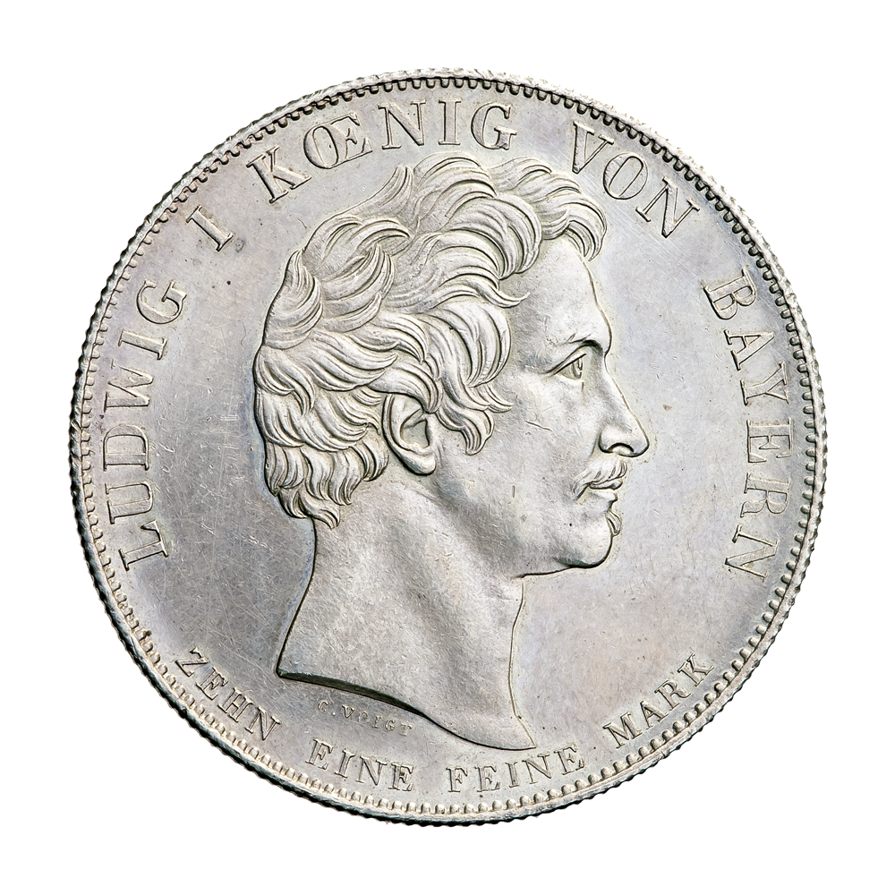 Бавария, королевство. Король Людвиг I (1825—1848). Талер 1828 г., т.н. «семейный». Памятная монета. Талер послужил прототипом и образцом для известного «Семейного полуторарублевика» императора Николая I в России в 1835 г. Серебро. Проба 833. Вес 28,02 г. Диаметр 38,0 мм. Гурт рубчатый.